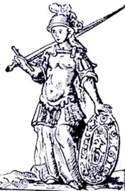 Maria Puteolana, personaggio leggendario della storia di Pozzuoli in un'antica stampa